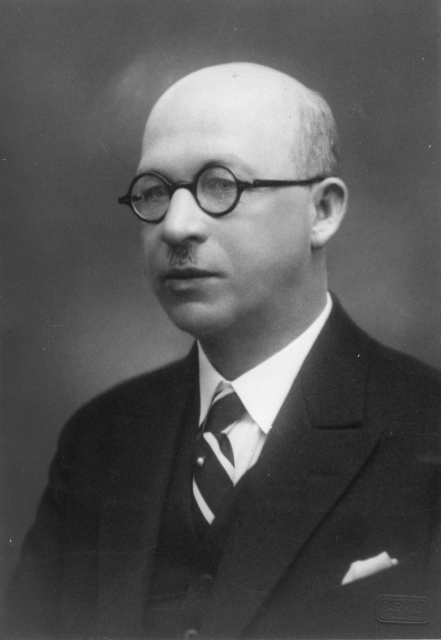 Saadik Julius Seljamaa